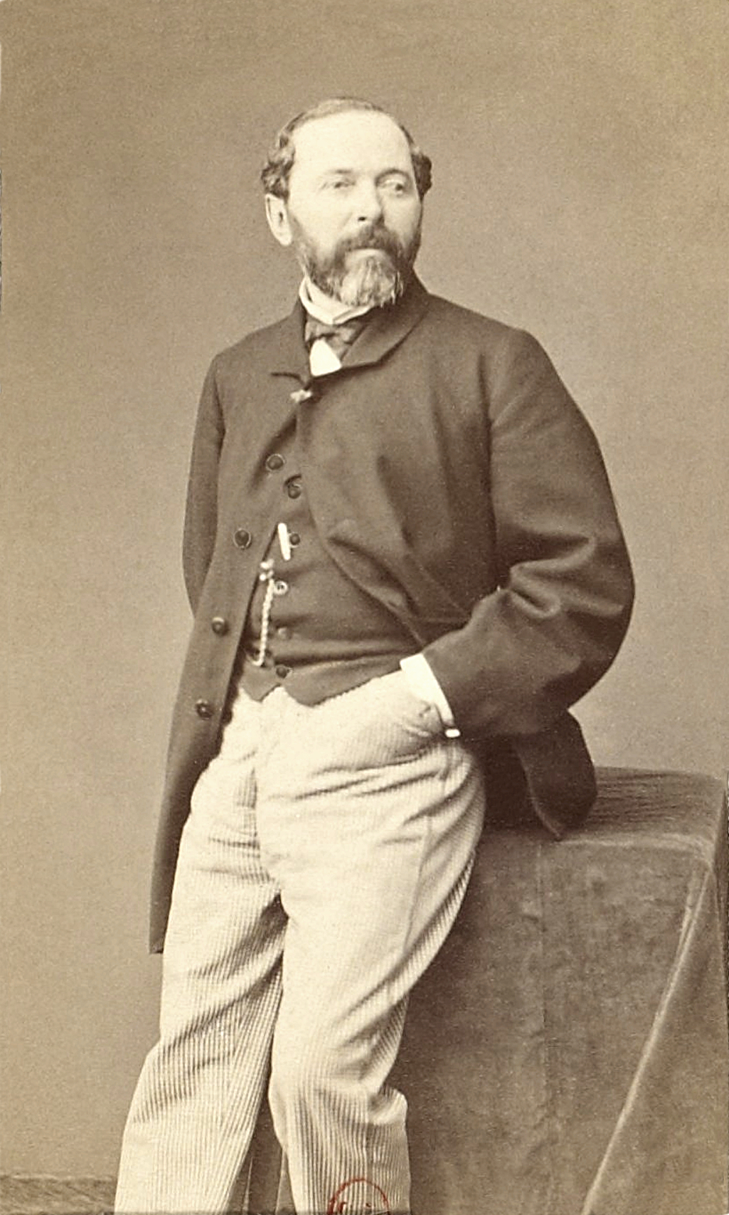 Charles de Tournemine (1812 - 1872), peintre orientaliste français.